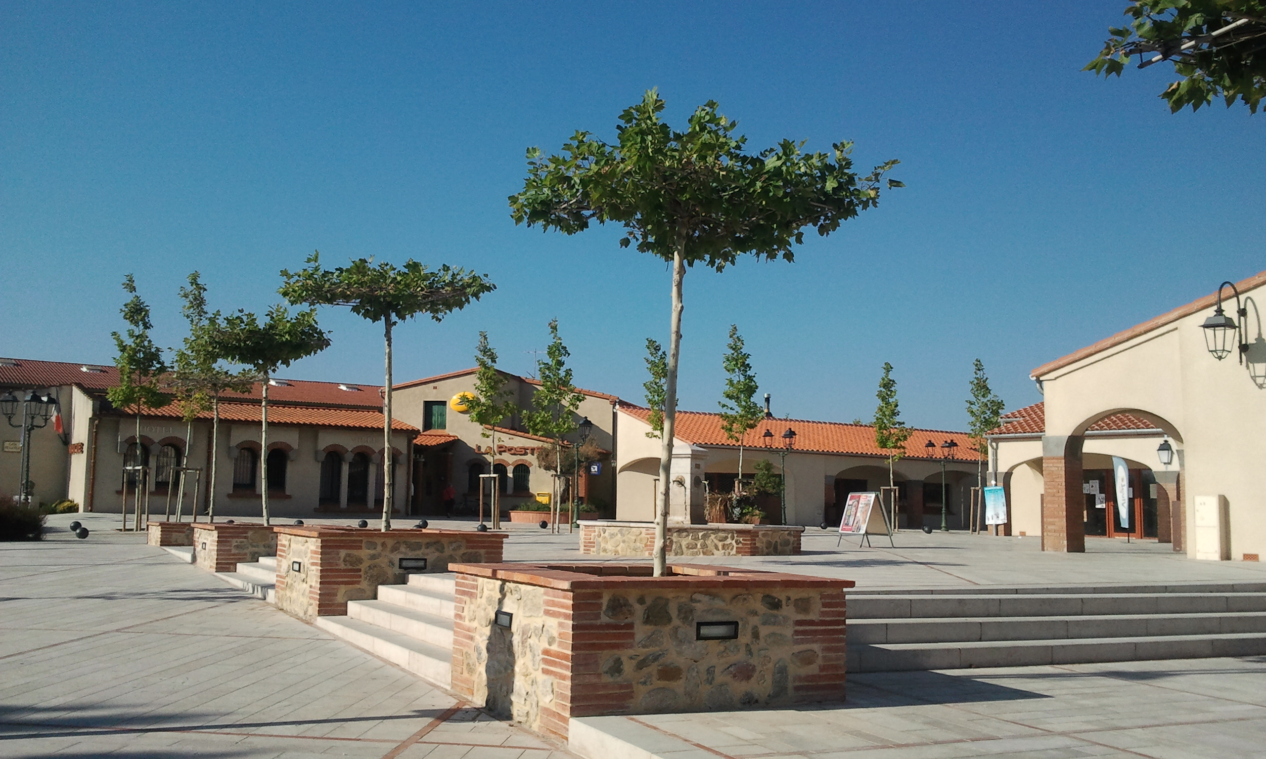 Square Guy Malé à Saint-Jean-Pla-de-Corts